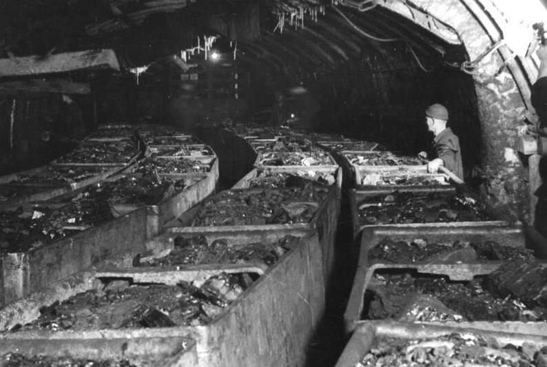 Zwickau, Schacht Brückenberg I Illus- Cürlis Schacht Brückenberg I, Zwickau. 1948 800 m tief warten Kohlenzüge auf die Fahrt ans Tageslicht. 2622-48